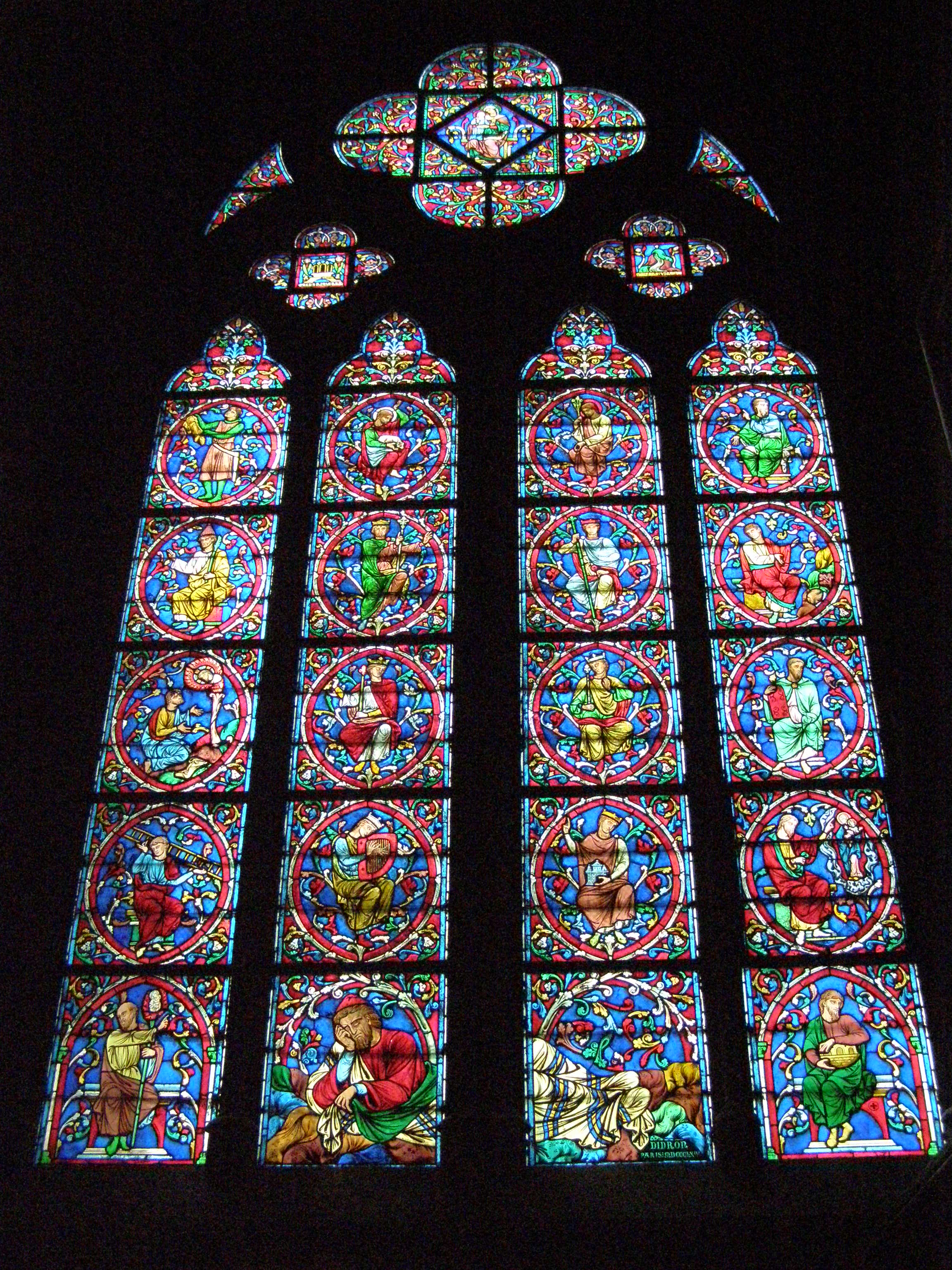 Cathédrale Notre-Dame de Paris